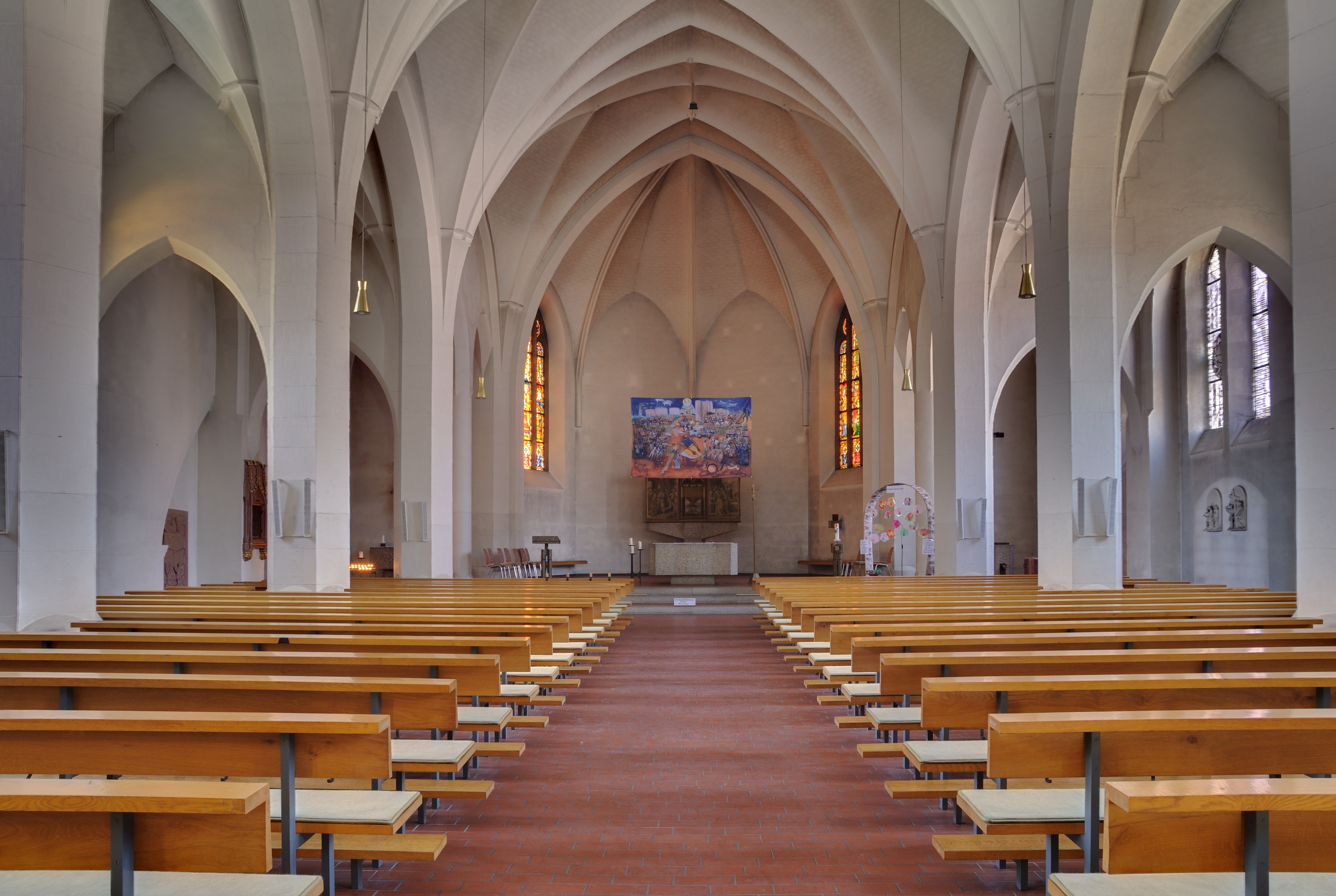 Wyhlen: Georgskirche, Blick vom Mittelschiff in den Chor